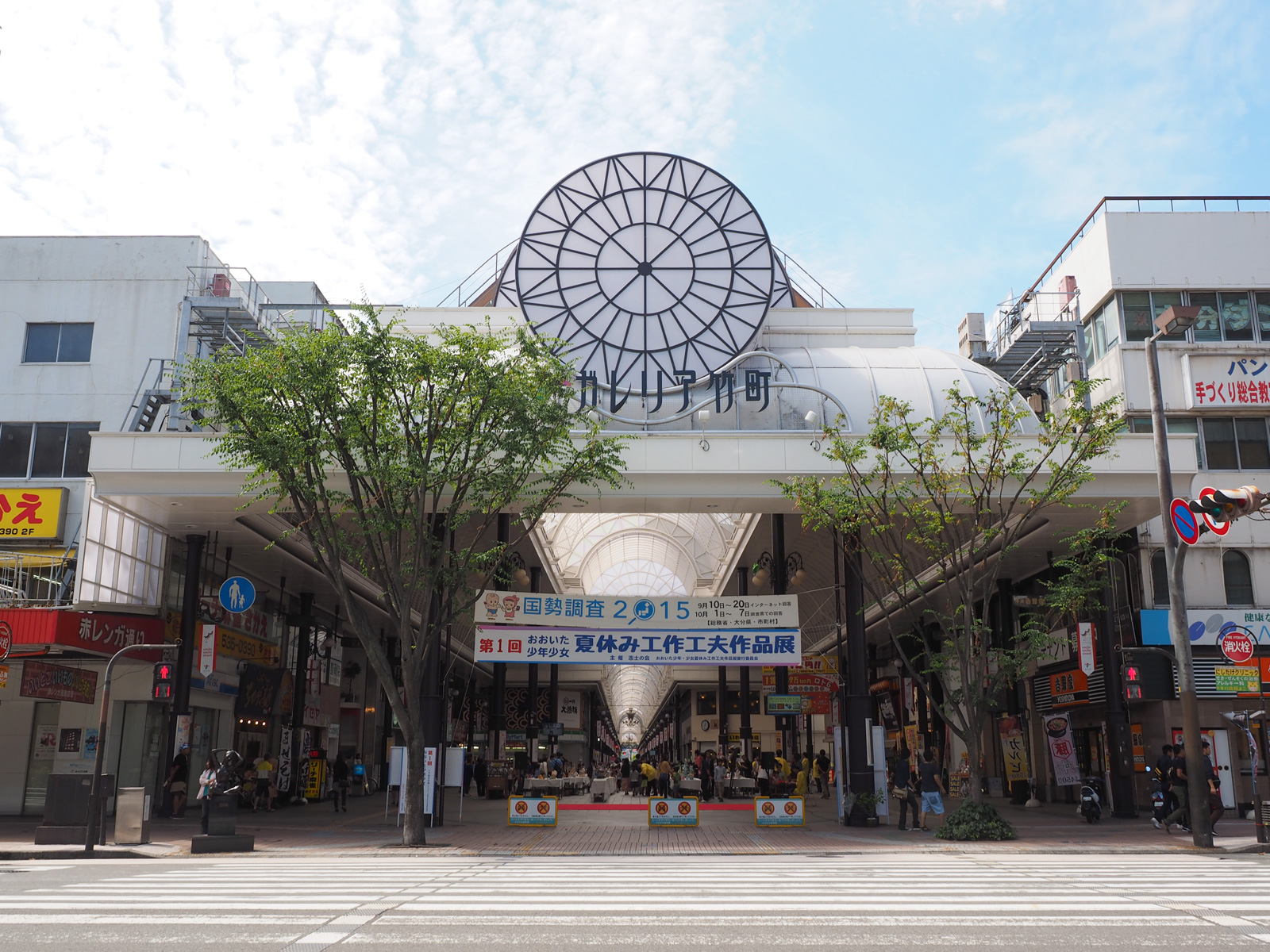 ガレリア竹町（大分県大分市）